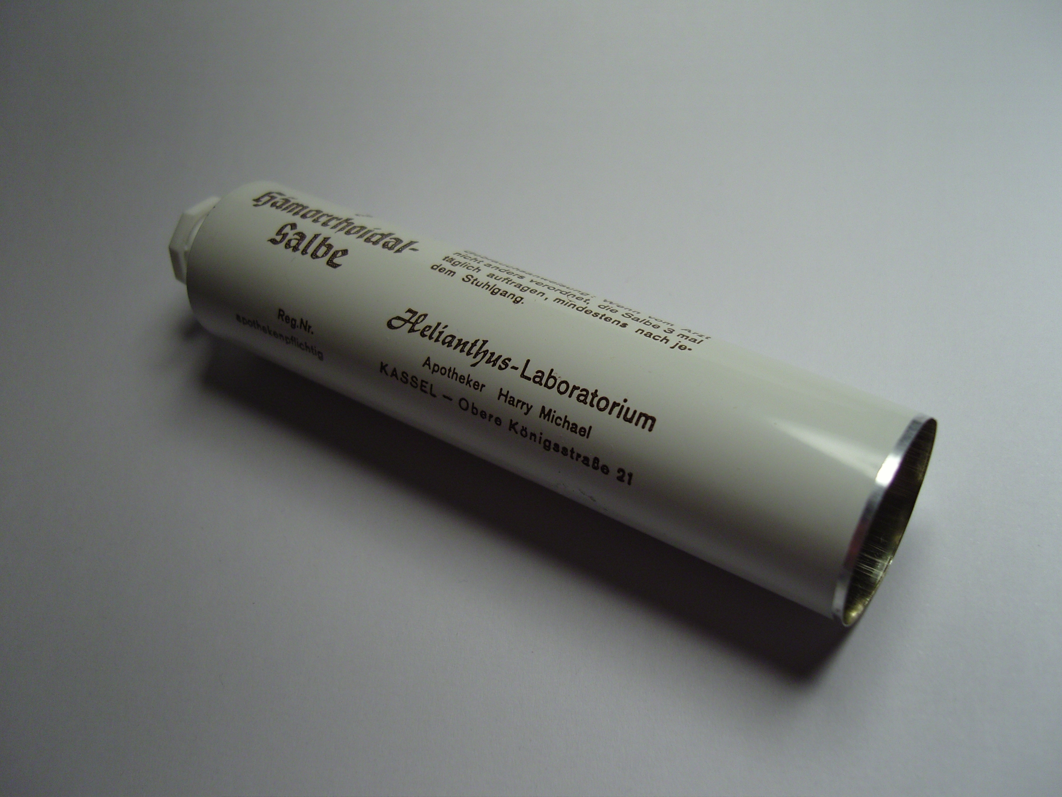 Leer Tube aus Kasseler Apotheke